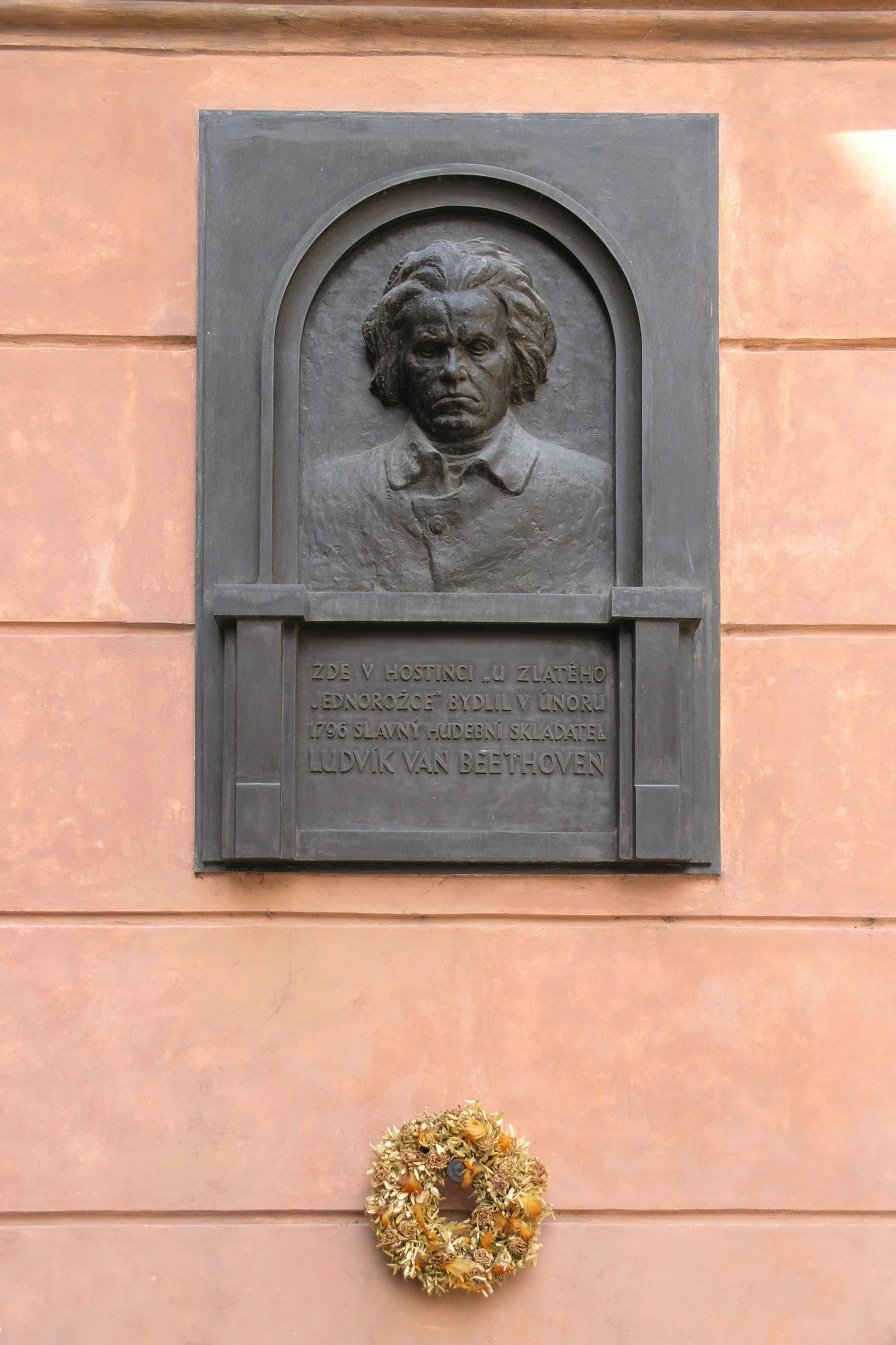 Praha, Malá Strana - Lázeňská ulice